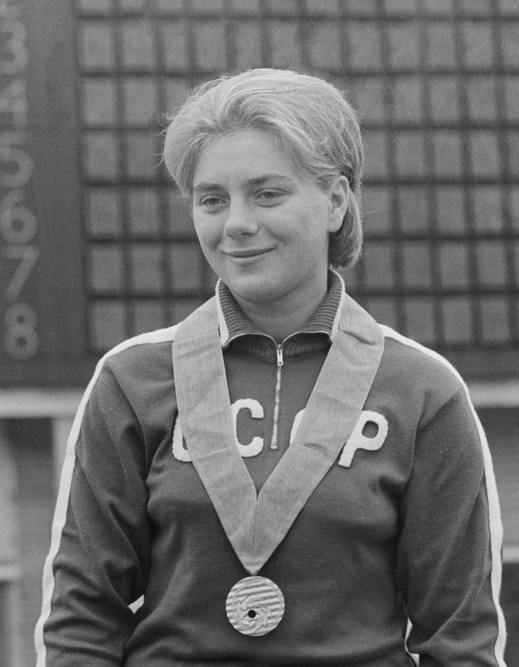 Europese Zwemkampioenschappen te Utrecht, schoonspringen drie meter plank, de kampioene Vera Baklanova (Rusland)